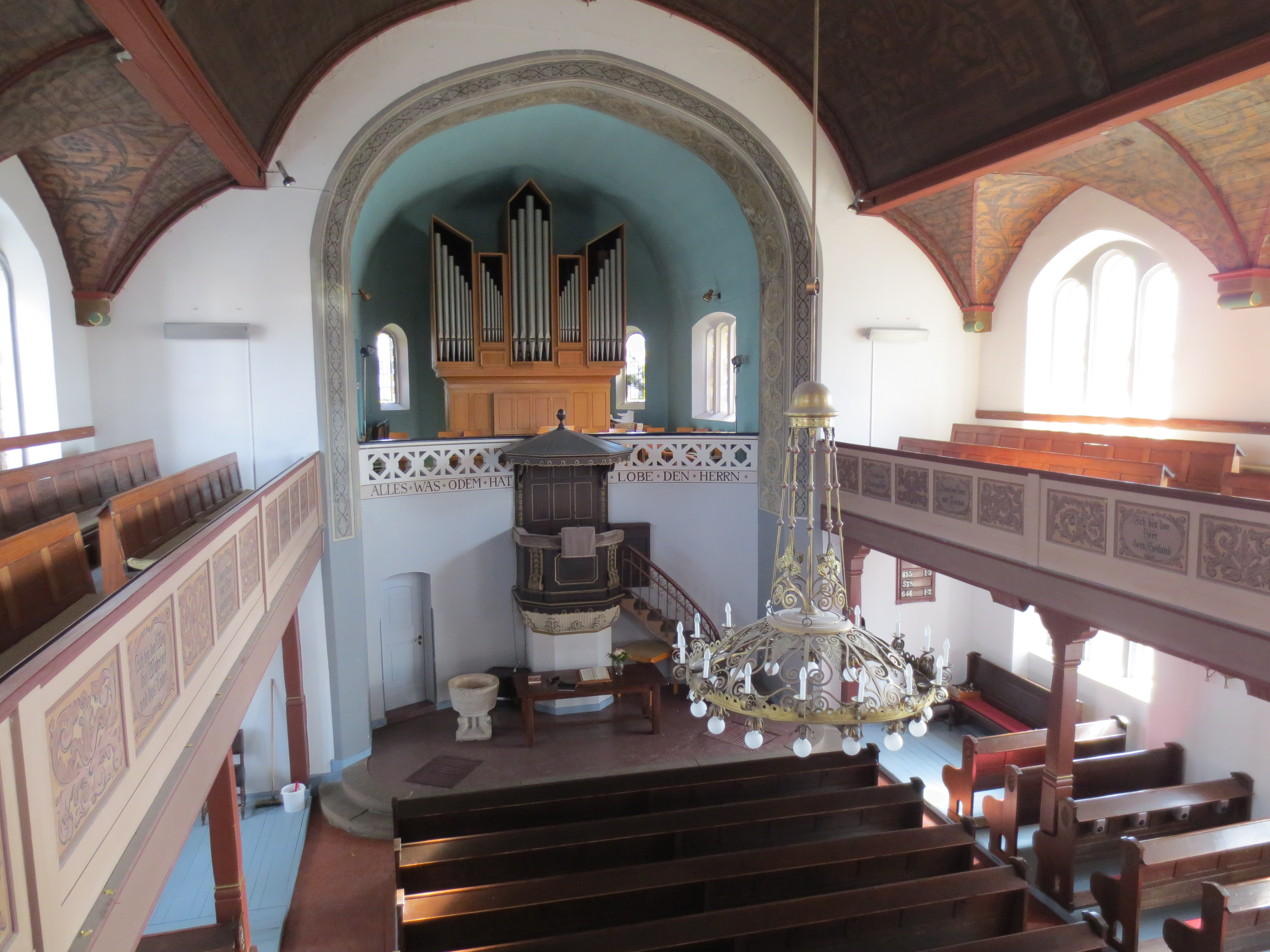 Emden-Borssum reformierte Jugendstilkirche Orgel